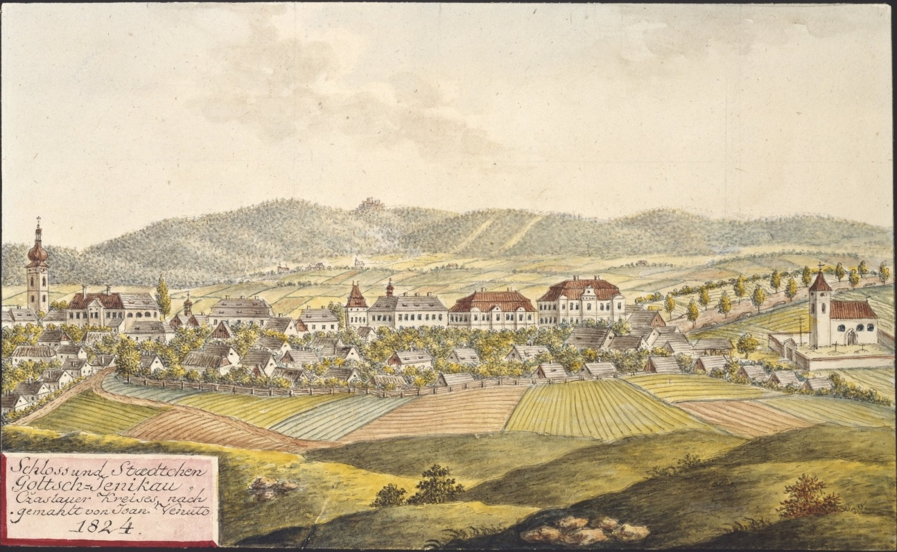 Zámek a městys Golčův Jeníkov. Schloss und Staedtchen Goltsch-Jenikau, Czaslauer Kreises, nachgemahlt von Joan. Venuto 1824